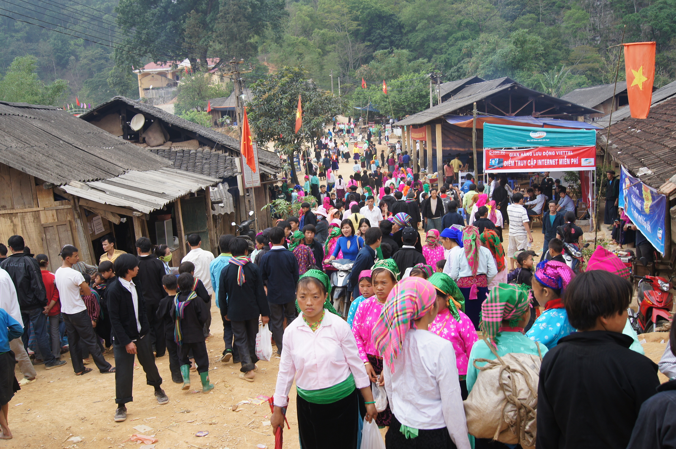 Chợ tình diễn ra ở xã Khau Vai, Mèo Vạc, Hà Giang vào ngày 27/3 Âm lịch hàng năm.